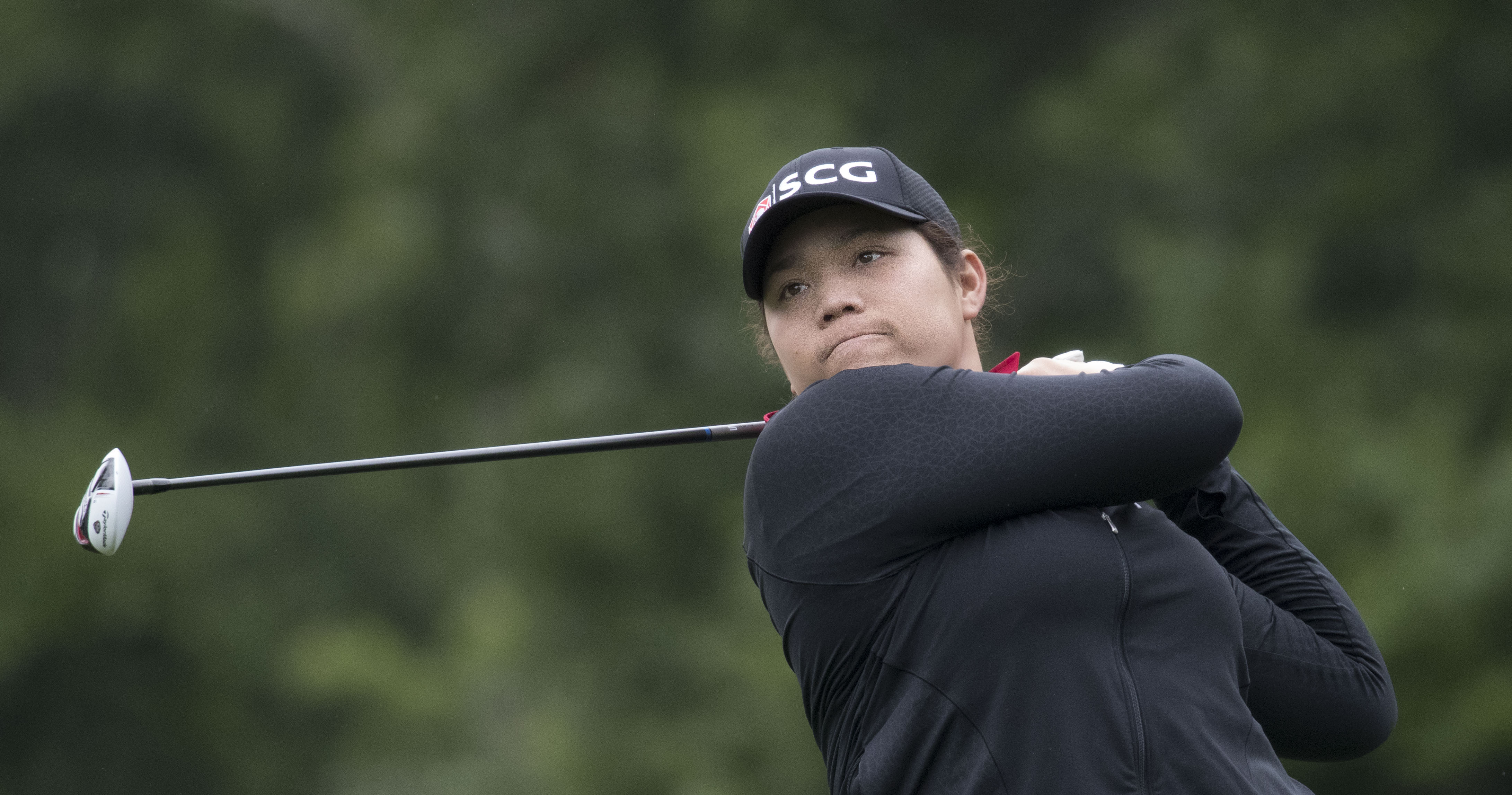 LPGA Kingsmill 2016